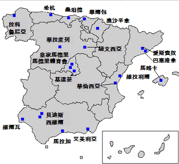 西甲0809球隊位置